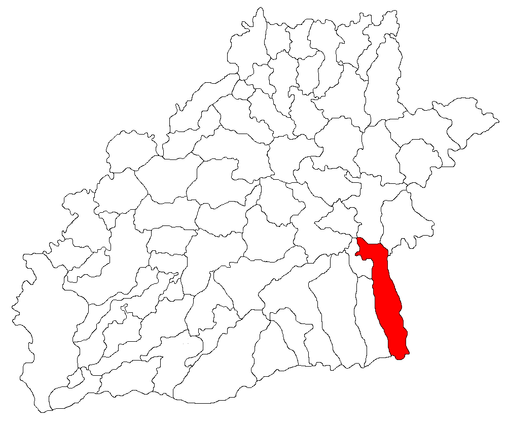 Categorie:Hărţi ale judeţului Sibiu